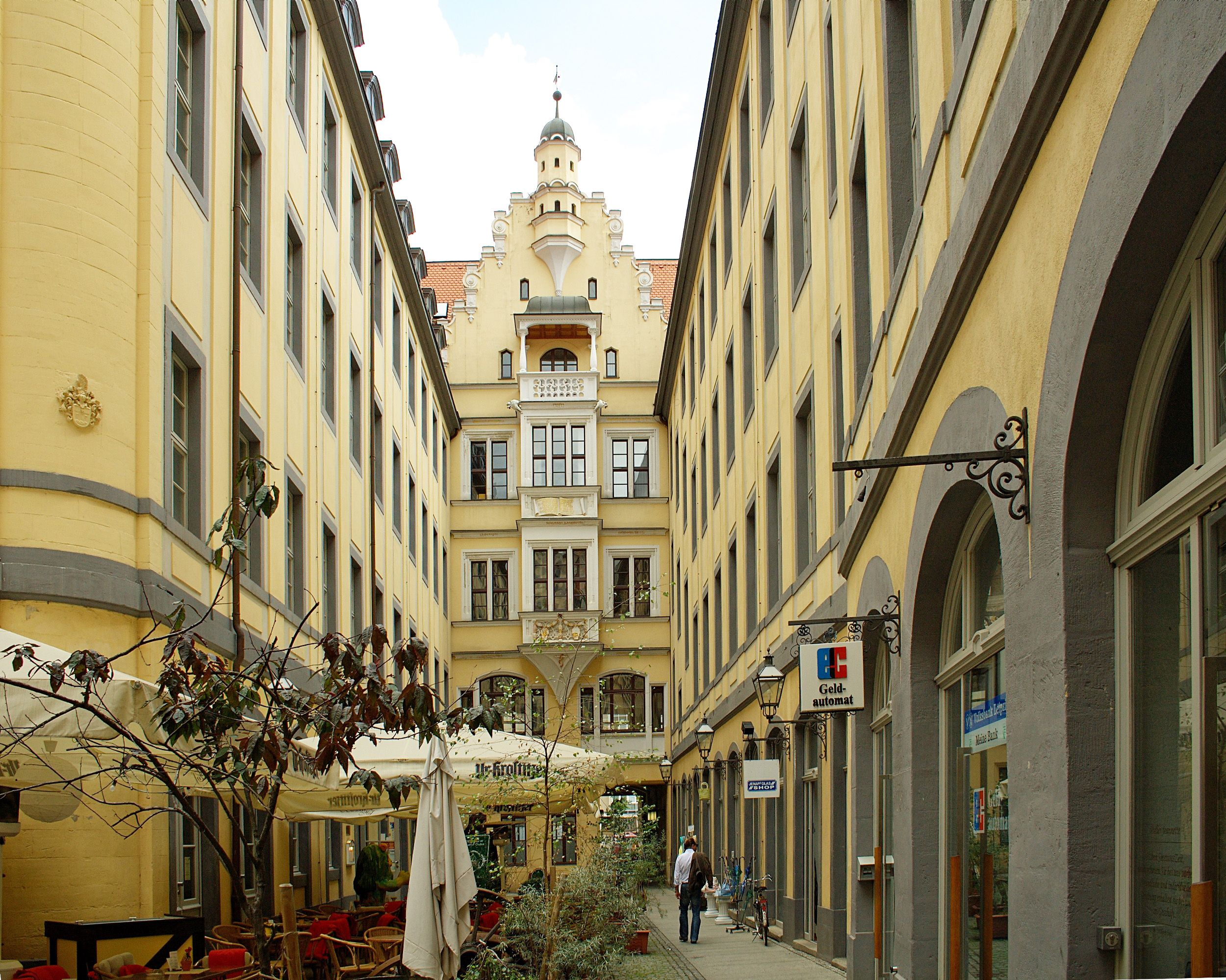 Der Barthels Hof in Leipzig. Camera data Camera Canon EOS 1000D Lens Canon EF-S 18-55mm 1:3.5-5.6 II Focal length 18 mm Aperture f/8 Exposure time 1/200 s Sensivity ISO 200